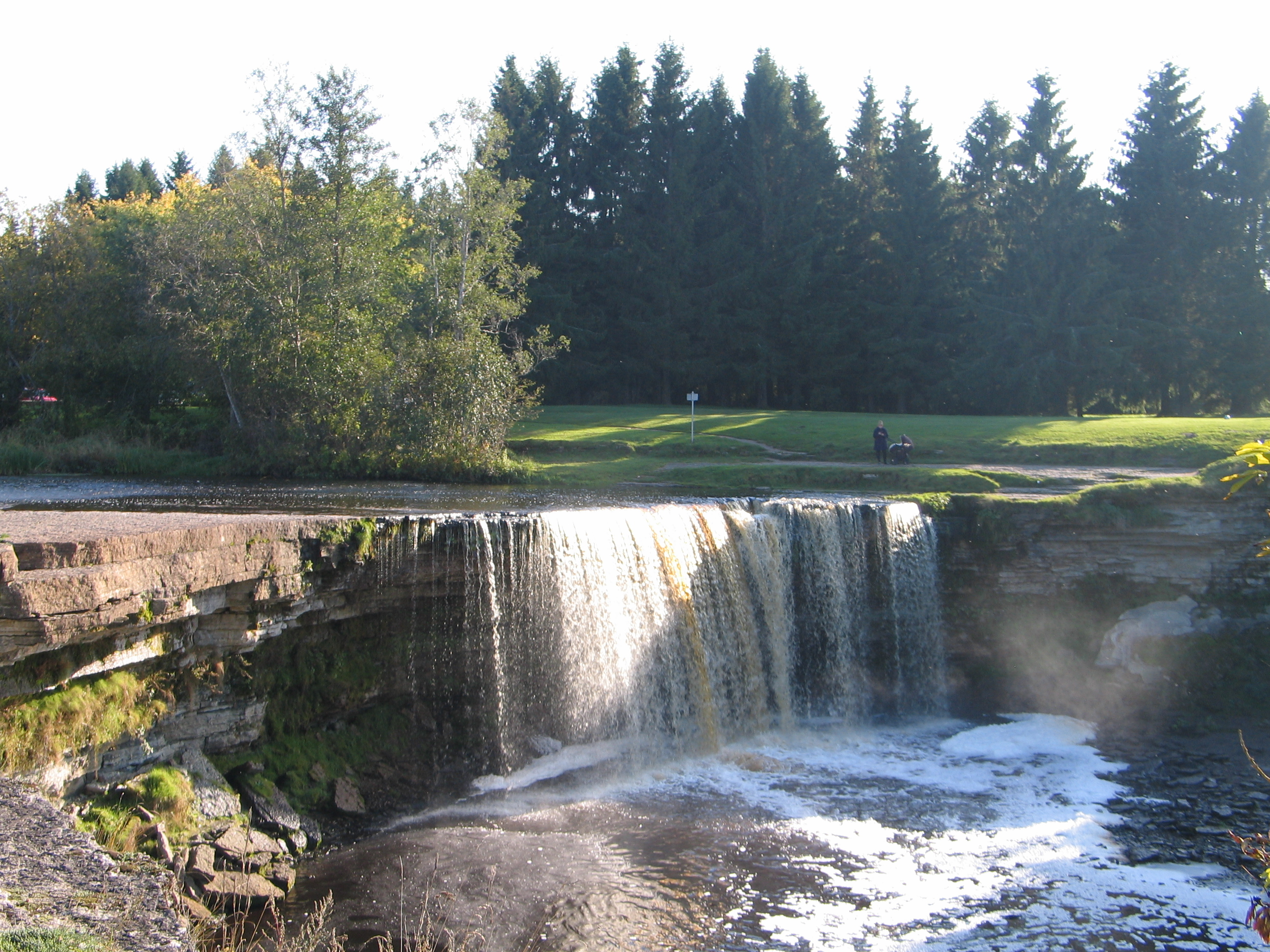 Водопад Ягала